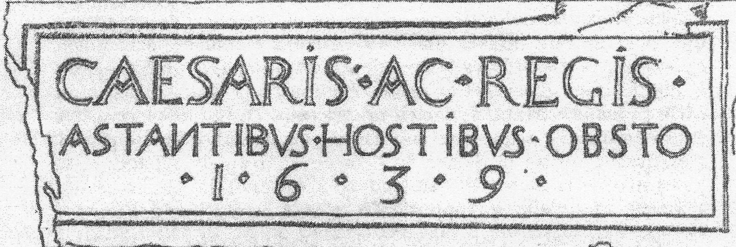 Linteau sur lequel a été gravé une phrase latine et la date de 1639